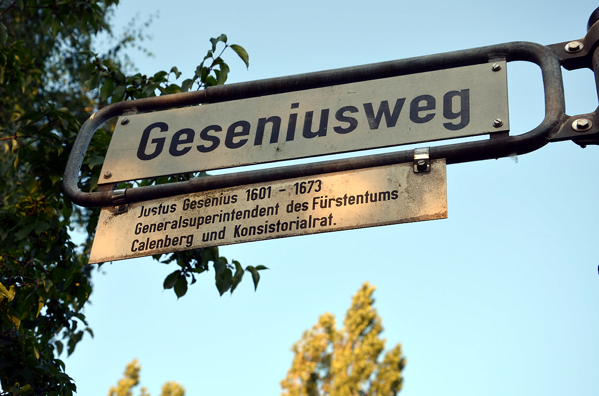 Die Legende am Straßenschild Geseniusweg in Hannover dokumentiert: „Justus Gesenius 1601-1673, Generalsuperintendent des Fürstentums Calenberg und Konsistorialrat“ ...